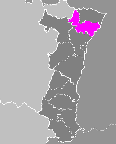 Maps of arrondissements and cantons of France: Arrondissement de Haguenau.PNG (Région Alsace)